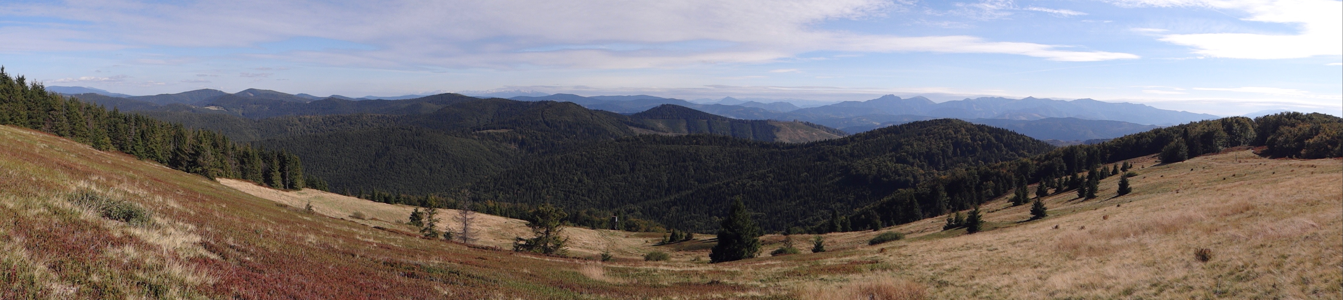 Hala na Małej Raczy w Beskidzie Żywieckim